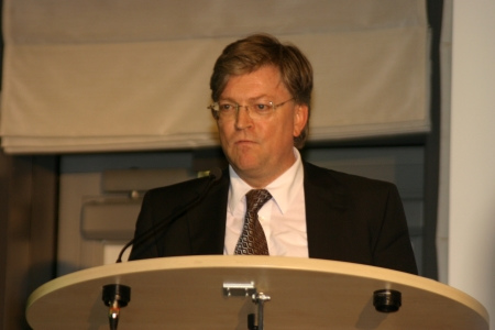 Staatsminister Michael Sagurna